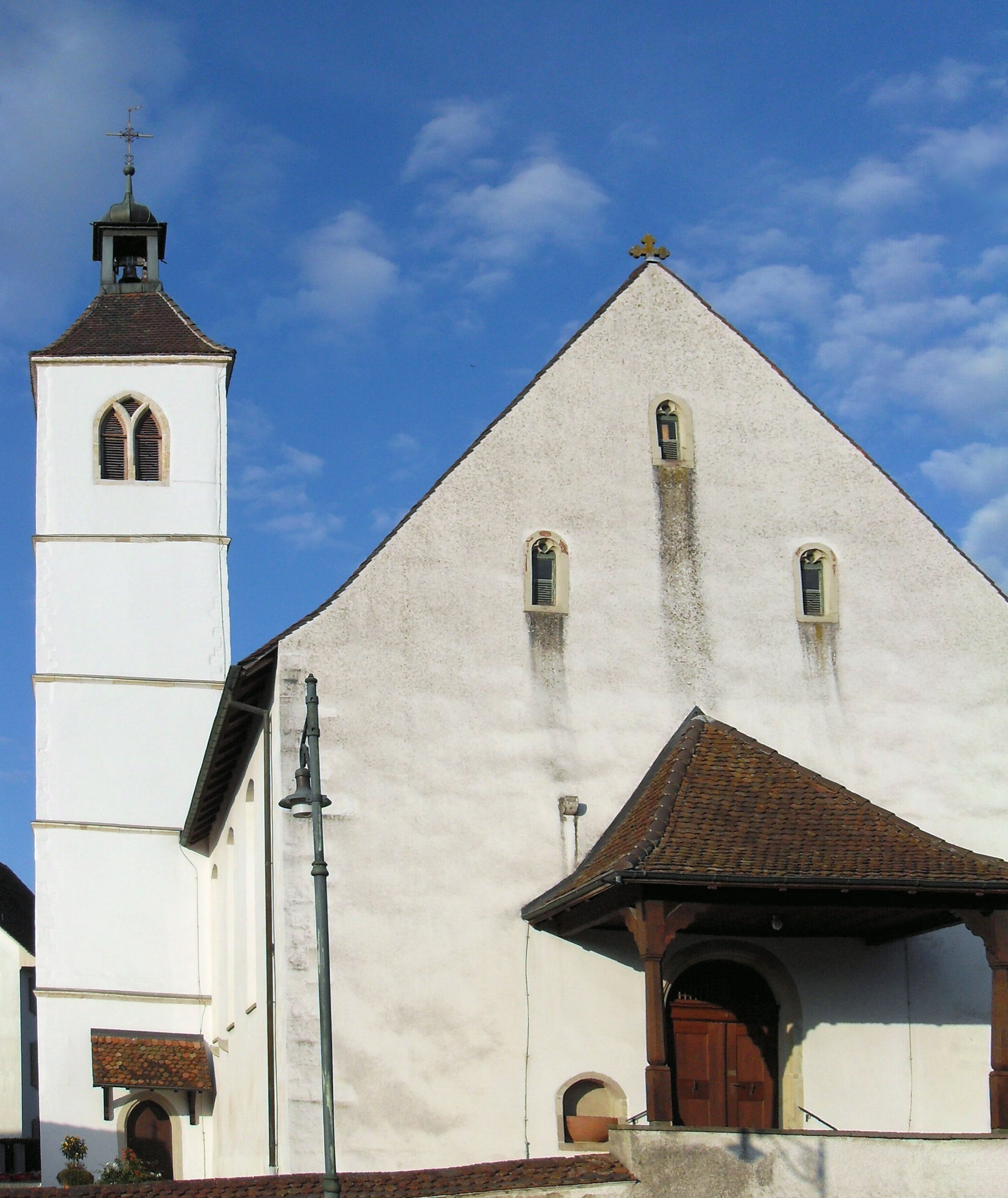 Katholische Pfarrkirche St. Laurentius in Rodersdorf, Kanton Solothurn, Schweiz